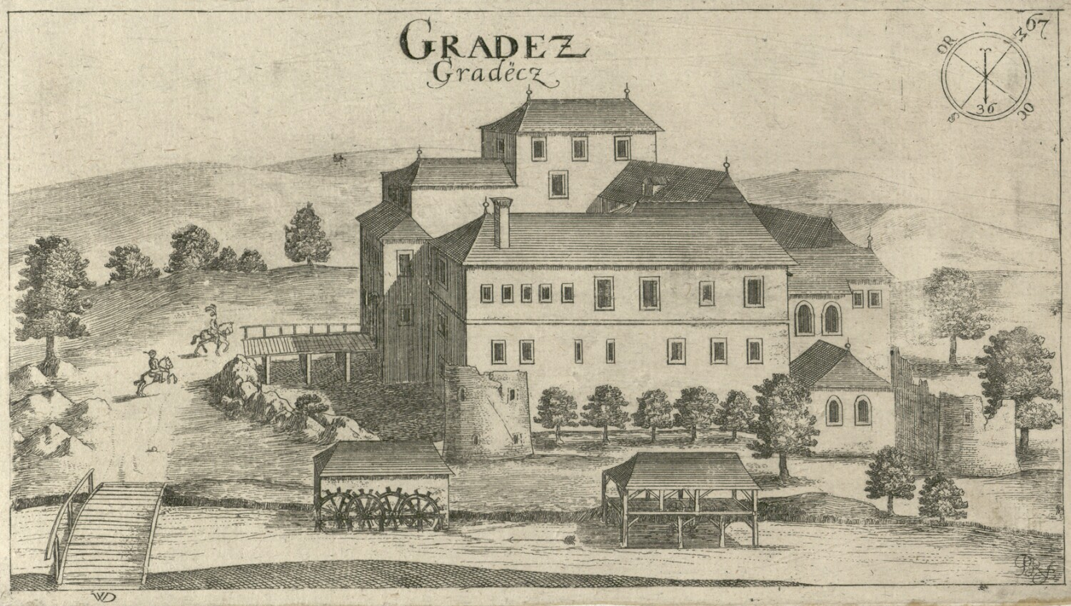 Grad Gradac